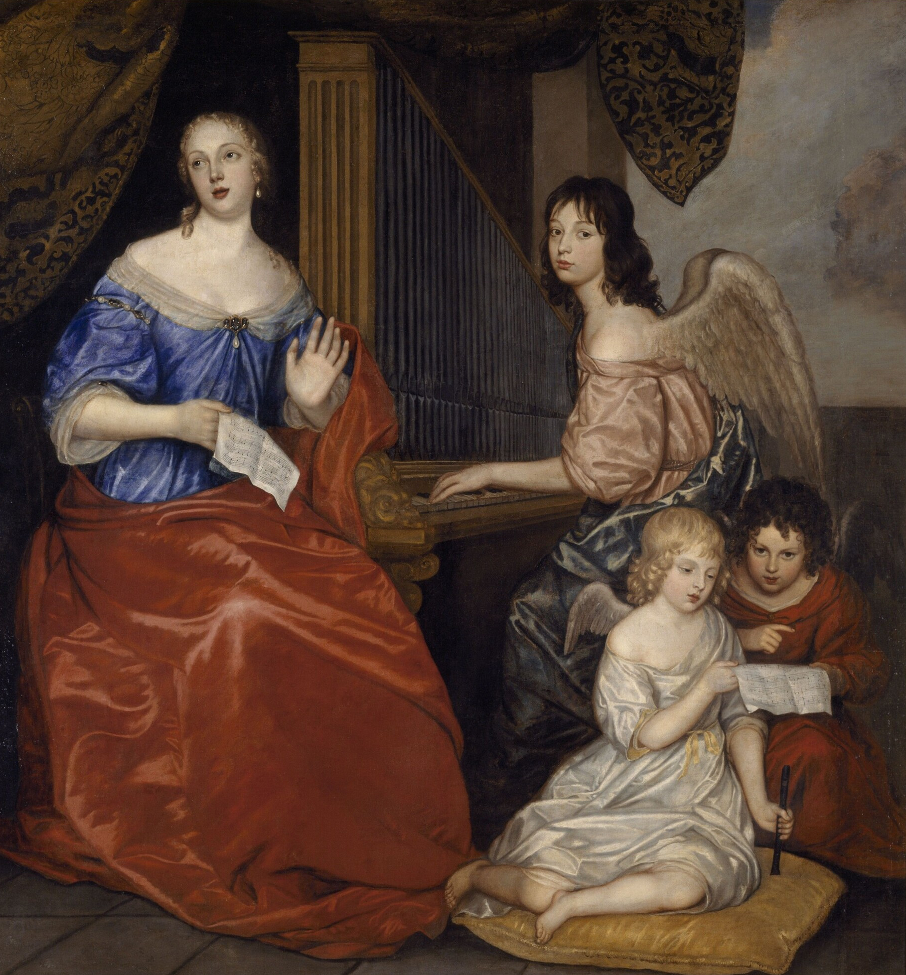 Mademoiselle de La Vallière et ses enfants par Peter Lely, huile sur toile, 222cm x 212cm, Musée des Beaux-Arts de Rennes, France.